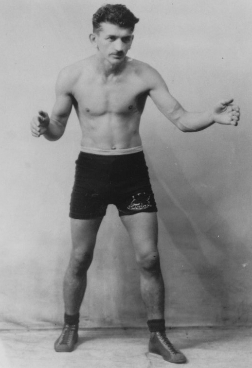 Il lottatore canadese Jim Trifunov.